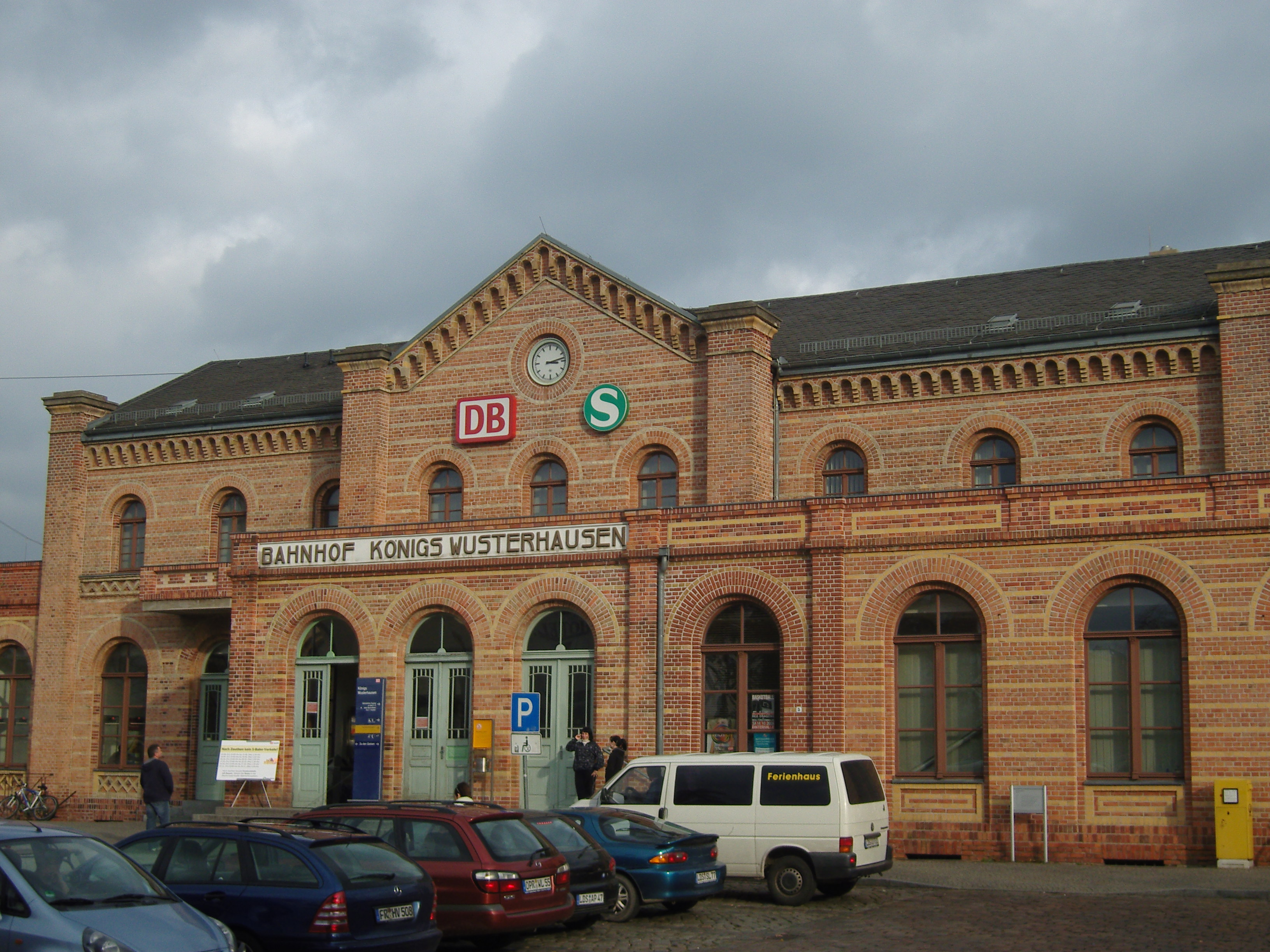 Bahnhofsgebäude in Königs Wusterhausen